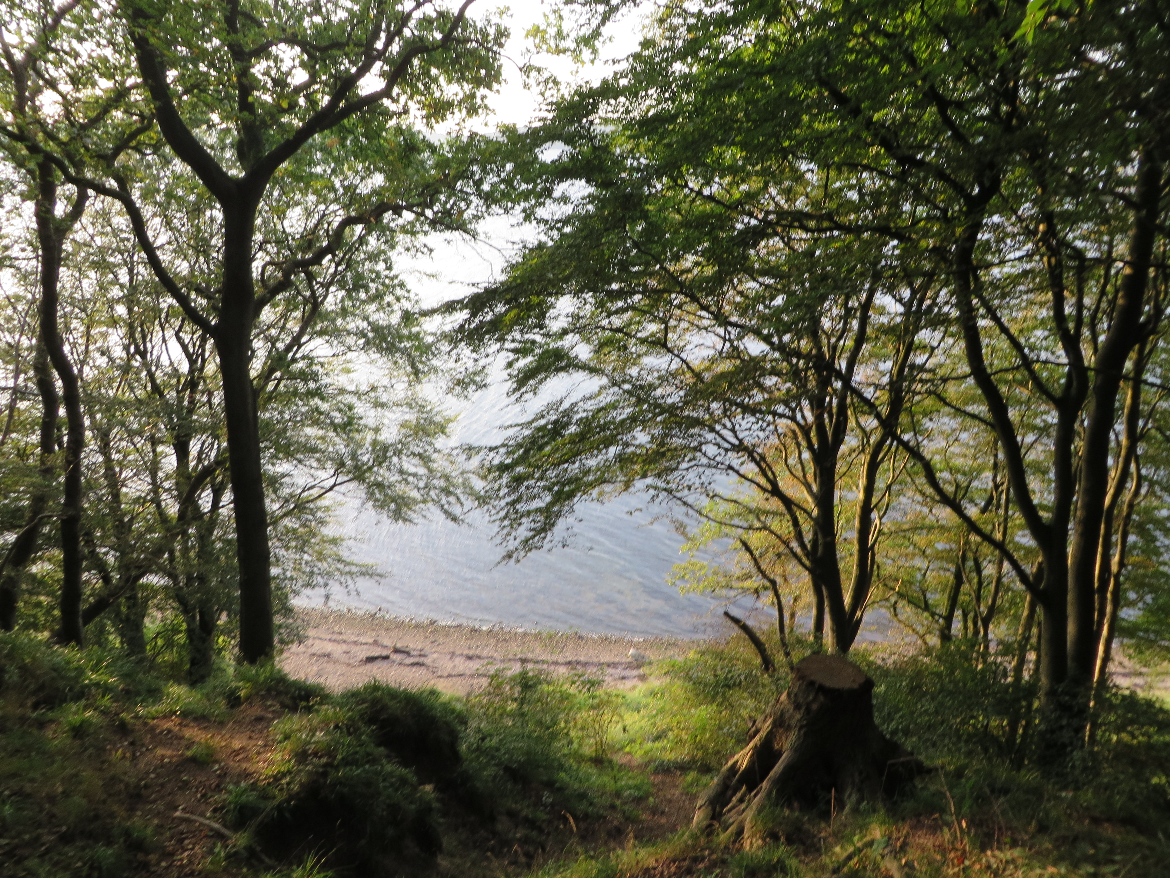 Twedter Mark, Fördehang runter zur Strandkante (Mürwik September 2014), Bild 09